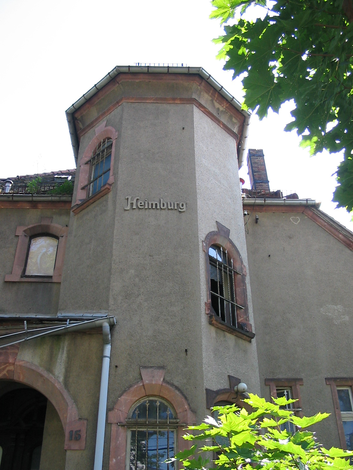 Villa Heimburg in Niederlößnitz, Treppenturm mit Inschrift